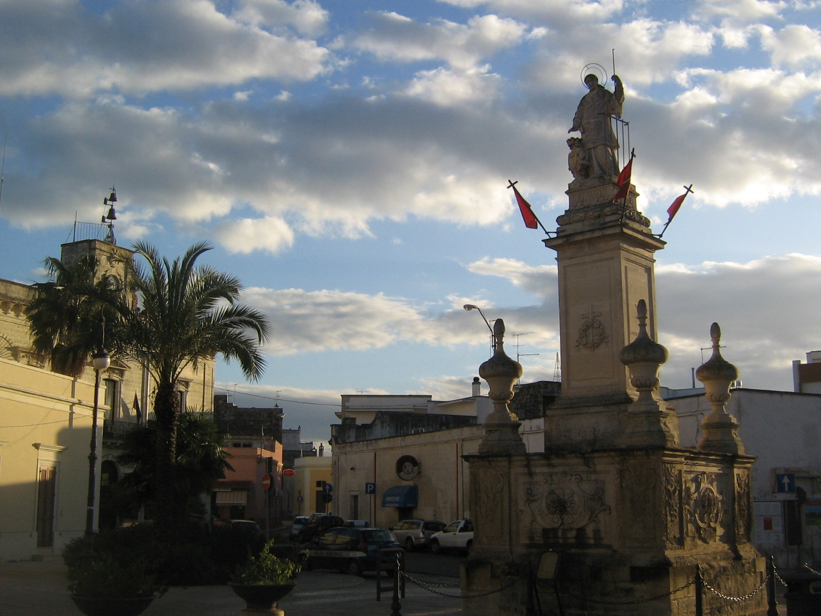 Monumento di San Lorenzo Lizzanello